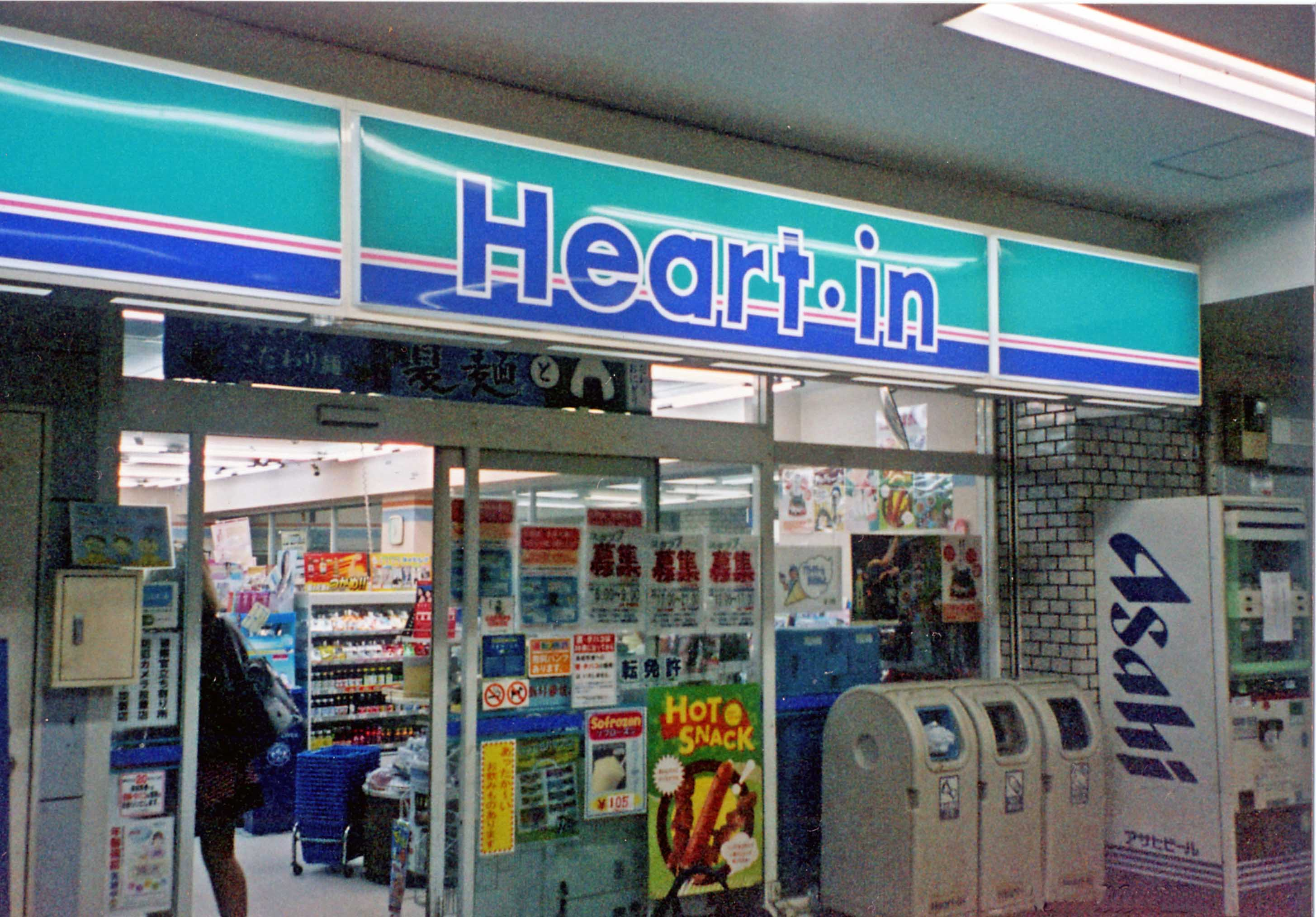 JR西日本神戸線須磨駅内にあるコンビニエンスストア「Heart In」